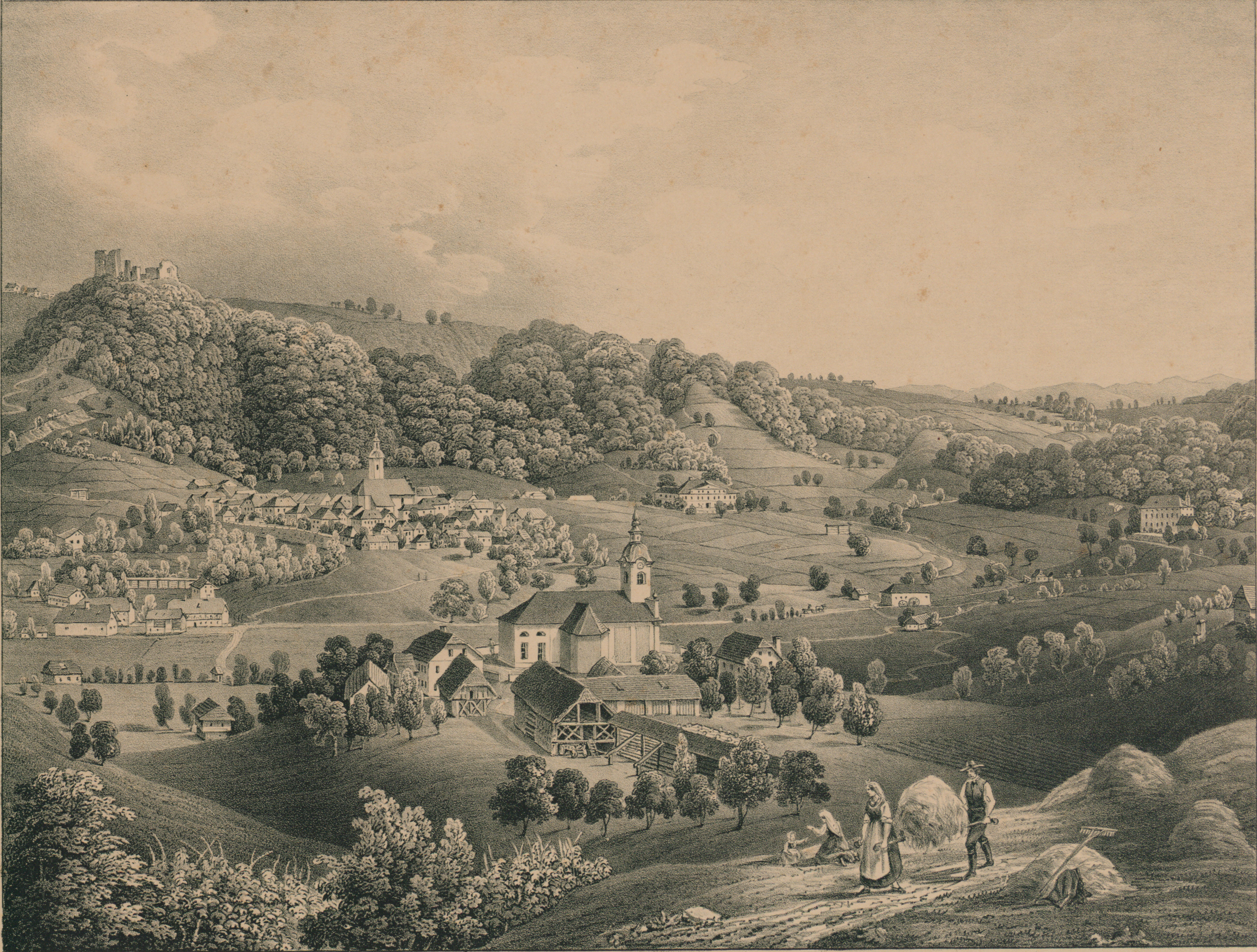 Litografija Višnje Gore iz zbirke Malerische Ansichten aus Krain.